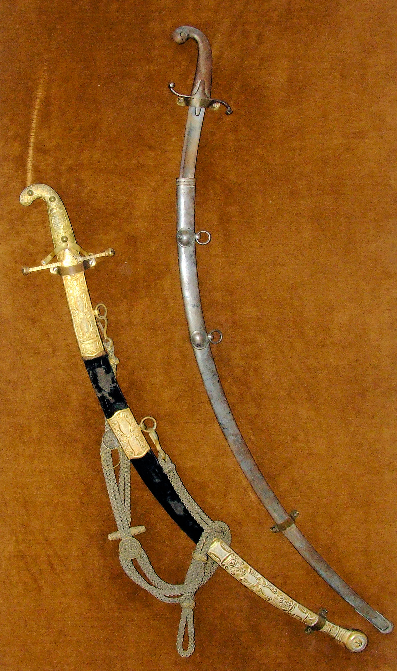 Kelemen József (Babits Mihály anyai nagyapja) jurátuskardja és a Kelemen család díszkardja. Babits Mihály Emlékház, Szekszárd